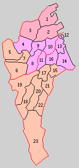 後の福岡県京都郡域の町村制時点の町村。